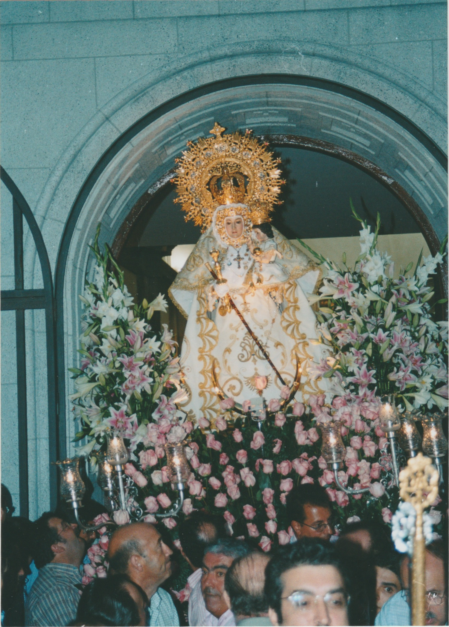 La imagen de Nuestra Señora de la Consolación Coronada, patrona de Pozuelo de Alarcón, abandona la parroquia Asunción de Nuestra Señora durante las fiestas en su honor, en el año 2000.